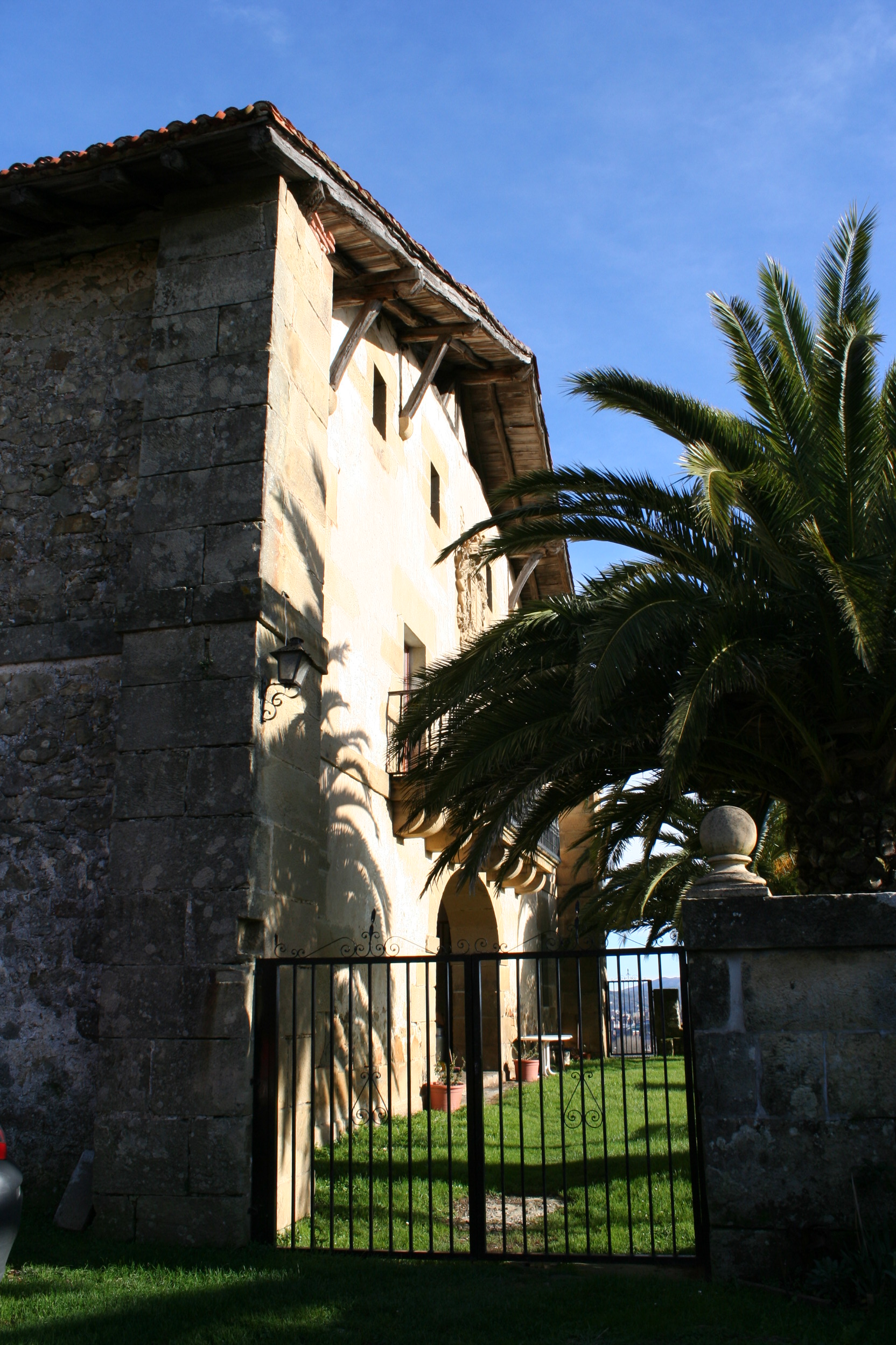 Ariztegieta baserriko sarrera eta fatxada nagusia albotik, Igara auzoan (Donostia)